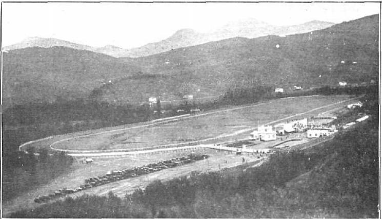 1916 hipodromoa panoramika